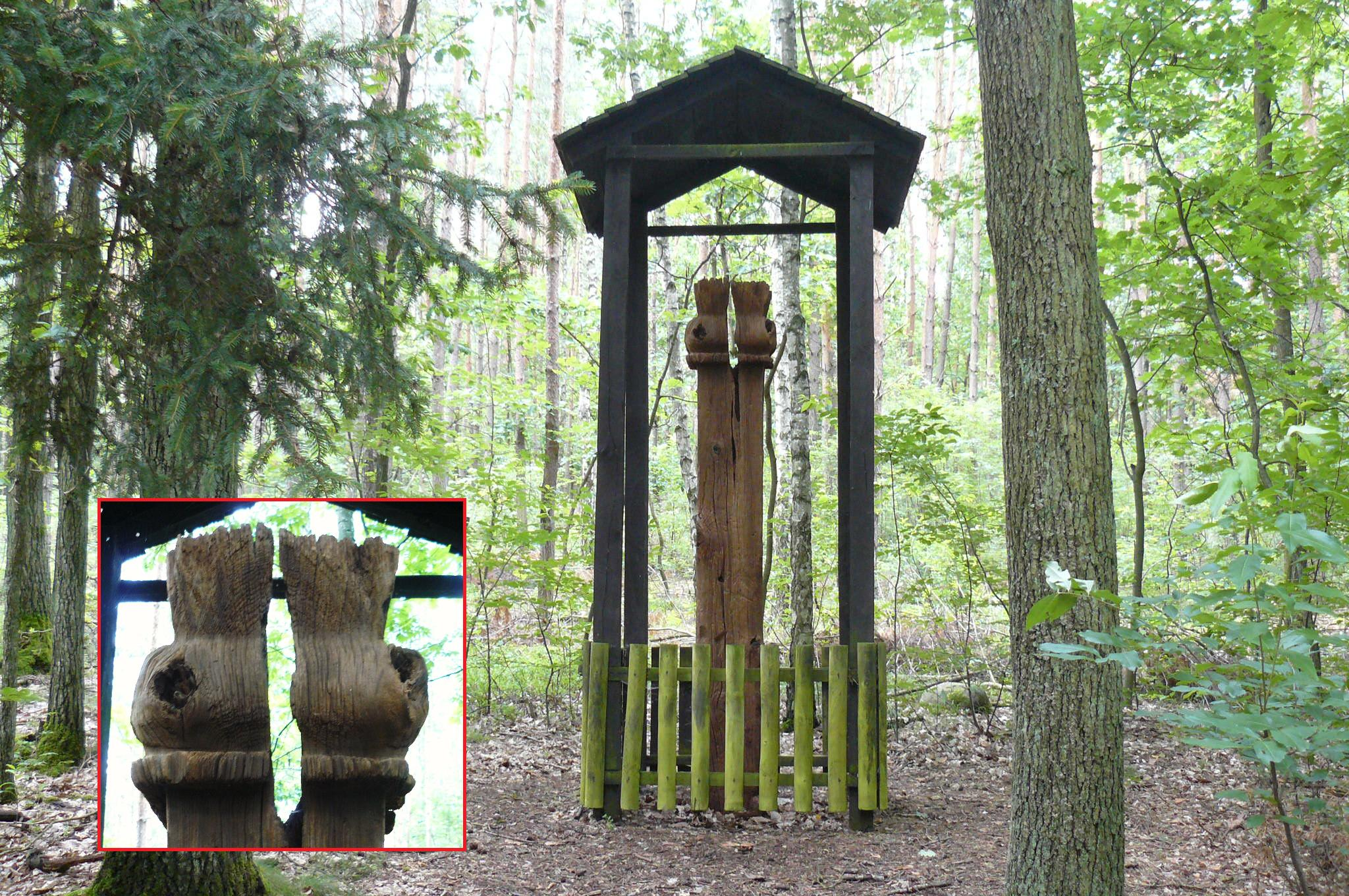 Tajemniczy słup w Puszczy Zielonce koło Zielonki.